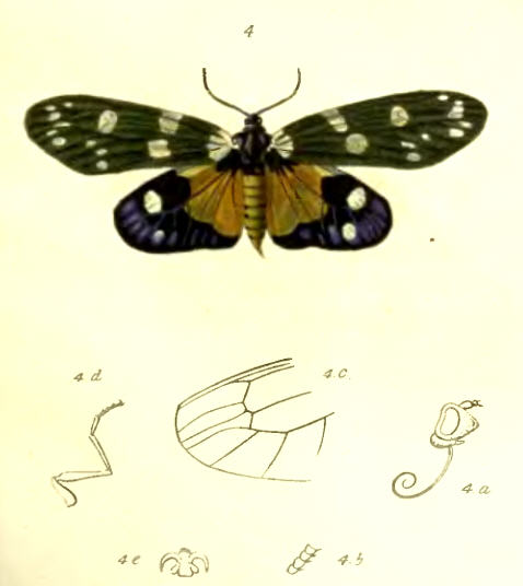 Eterusia tricolor, Lepidoptera, from Assam